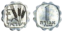 Израильская агора 1960 года выпуска аверс и реверс